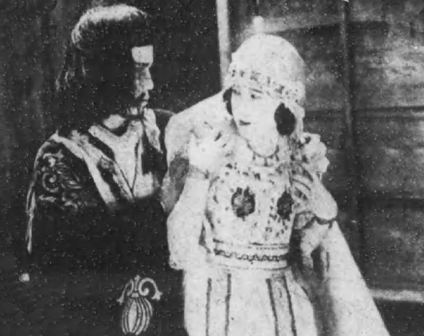 『ロビンフットの夢』（-ゆめ）は、1924年（大正13年）製作・公開、金森万象監督による日本の劇映画である。「ロビンフッド」は誤り